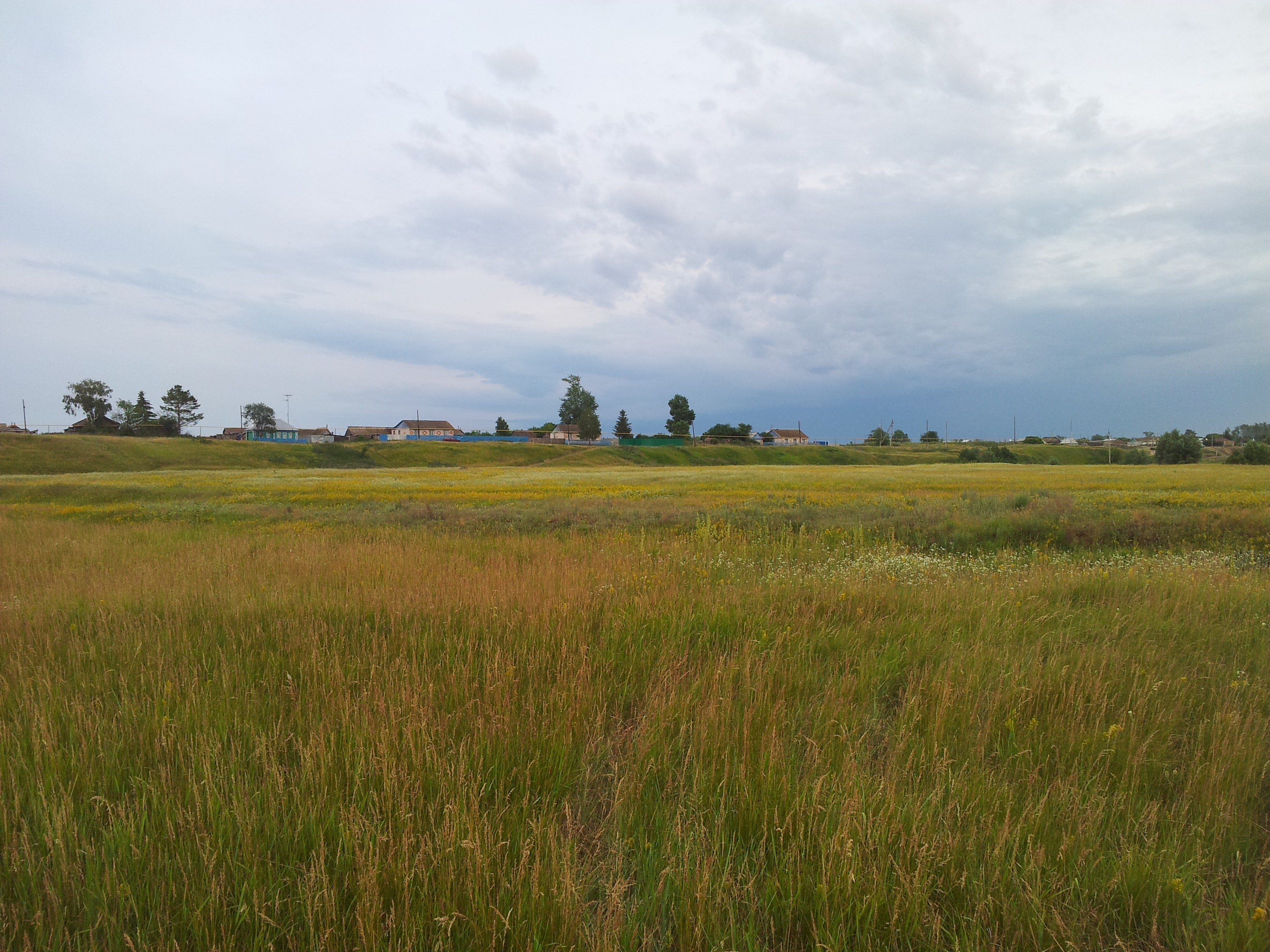 Салманы ул.Береговая (Иванов В.Н.)